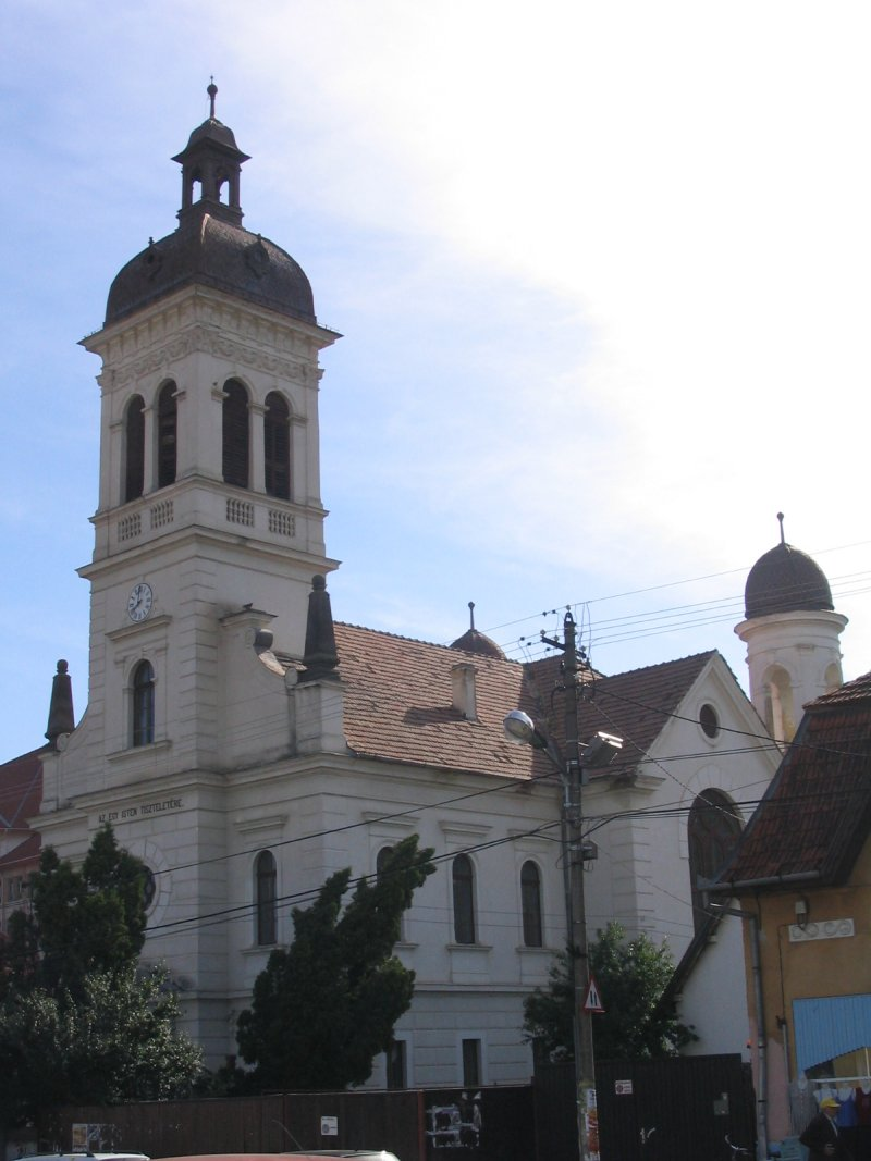 Székelyudvarhelyi unitárius templom, 2005